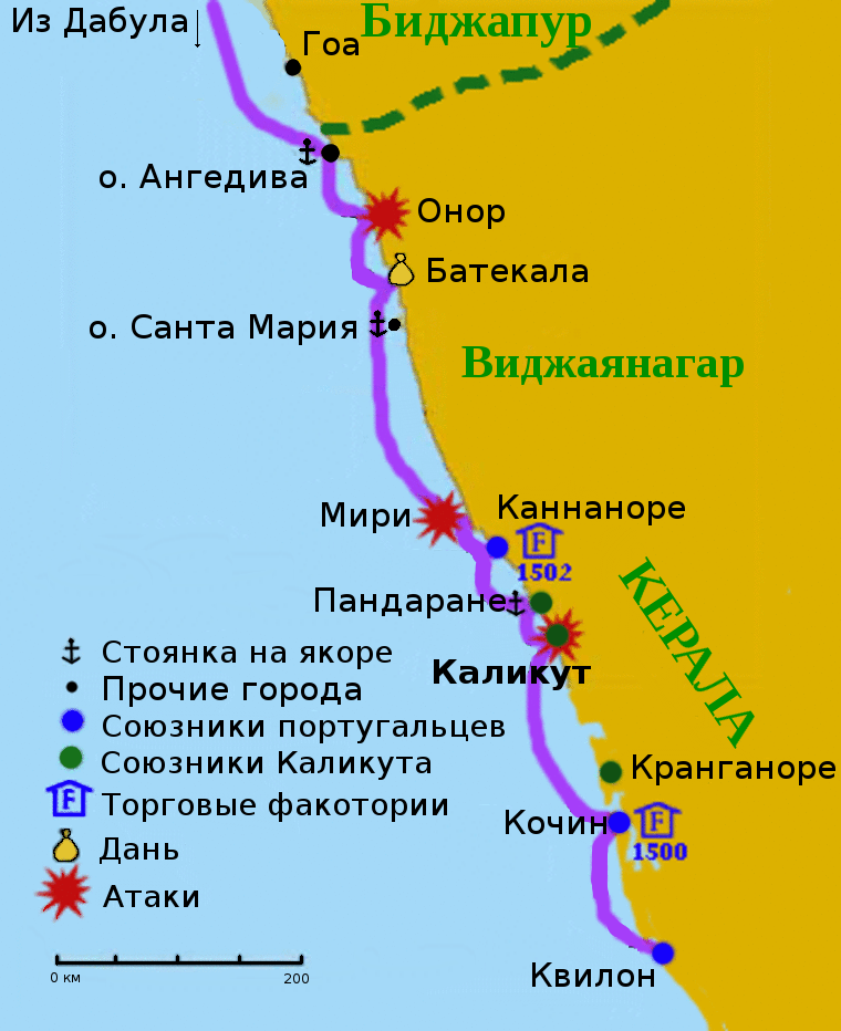 Малабарский берег Индии, маршрут возглавляемой Васко да Гама 4-й Индийской армады Португалии (1502 год).